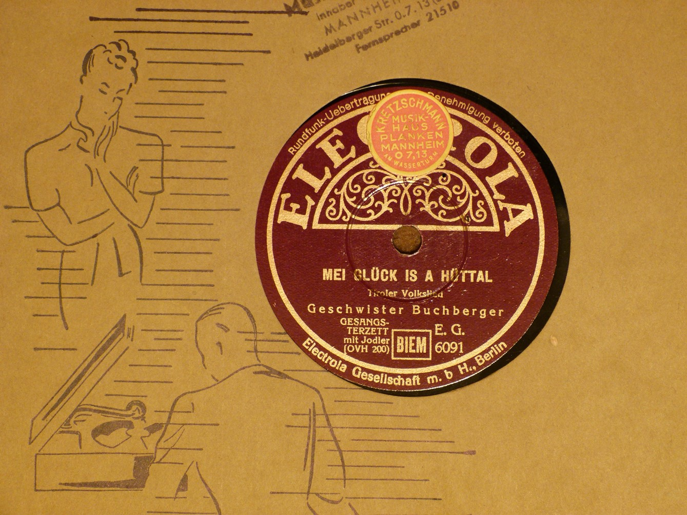 Geschwister Buchberger auf Electrola, ca. 1936 EG 6091 / OVH200 "Mei Glück is a Hüttal", Echojodler